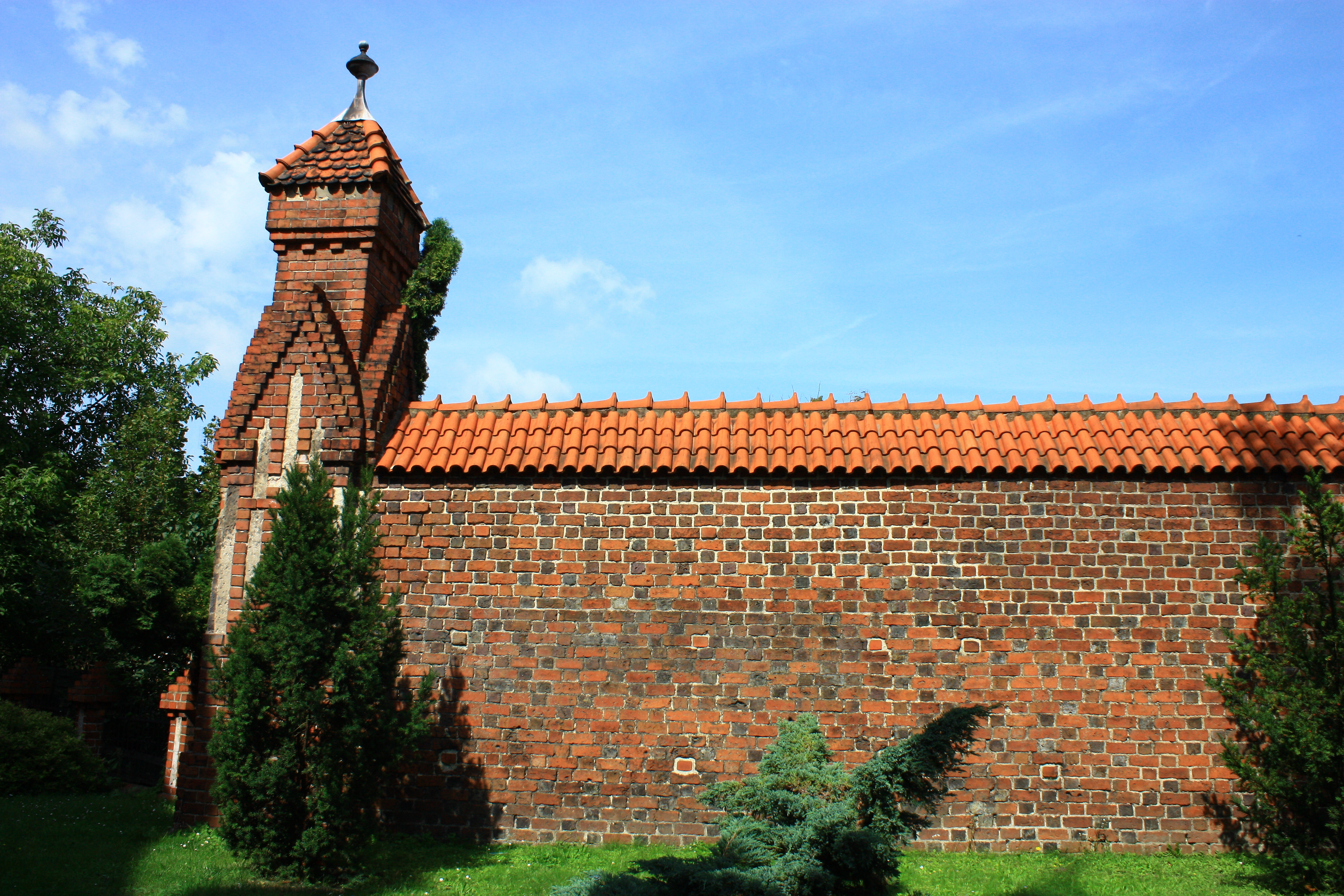 Syców, pozostałości murów obronnych, XIV, XV, 1578